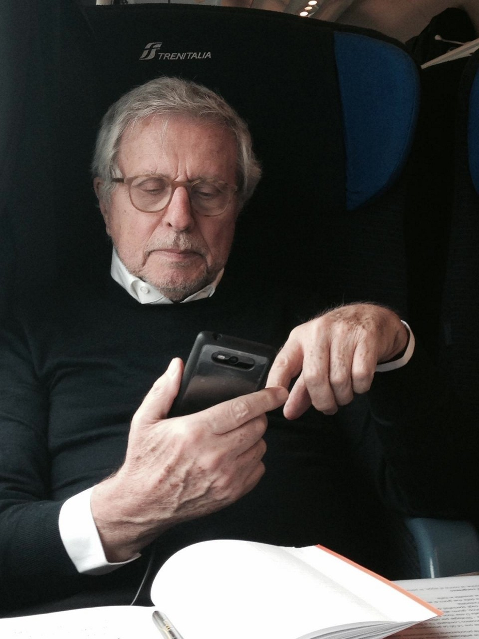 Professor Carlo Flamigni (Forlì, 4 febbraio 1933) è un medico, accademico e scrittore italiano, già professore ordinario, sempre presso l'Università di Bologna, di endocrinologia ginecologia e poi di ginecologia e ostetricia, proseguendo poi l'attività di docenza fino al 2008 come docente fuori ruolo. Nell'ambito medico, tra il 1975 e il 1994 è stato direttore del servizio di Fisiopatologia della riproduzione per divenire poi direttore della clinica ostetrica e ginecologica dell'Università degli Studi di Bologna, incarico ricoperto fino al 2001. È presidente onorario della Associazione italiana per l'educazione demografica (AIED). È socio onorario della Consulta di bioetica. Nel campo della pubblicistica e della saggistica, oltre a collaborare con numerose riviste scientifiche, è stato autore di un migliaio di memorie scientifiche nonché di molti libri, relativi soprattutto a problemi riguardanti la salute della donna e agli aspetti medici e bioetici legati alla riproduzione e alla fecondazione assistita. Come scrittore, è autore di racconti, di storie poliziesche e di libri per l'infanzia. Nel 2011 ha vinto il premio letterario Serantini per il suo "Un tranquillo Paese di Romagna". Il suo sito personale raccoglie i suoi scritti prevalentemente dedicati a temi etici e biomedici.